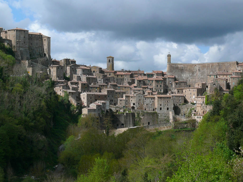 Sorano